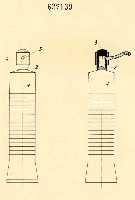 Disegno per il brevetto per invenzione industriale n. 627139, classe B 67 b., di Giovanni Cardinale per una chiusura per tubetti del tipo dentifricio costituita da un manicotto atto a consentire la fuoriuscita laterale del prodotto, Genova. Data di deposito: 14 aprile 1960. Data di concessione: 26 ottobre 1961 (AS Genova, Ufficio provinciale industria, commercio e artigianato di Genova, Fondo Brevetti)